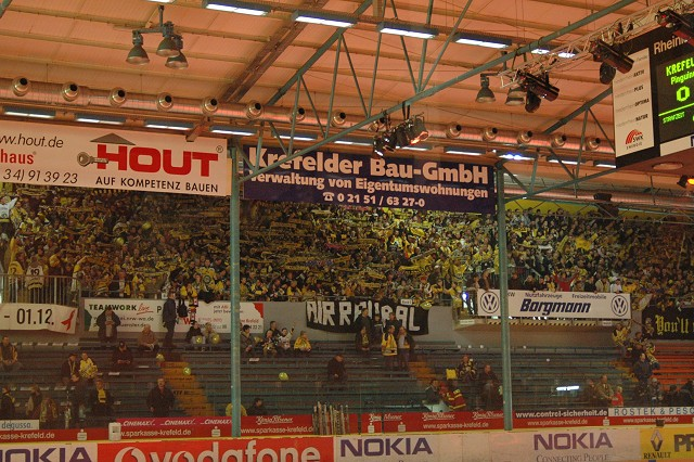 Rheinlandhalle (Krefeld) Abschiedsspiel